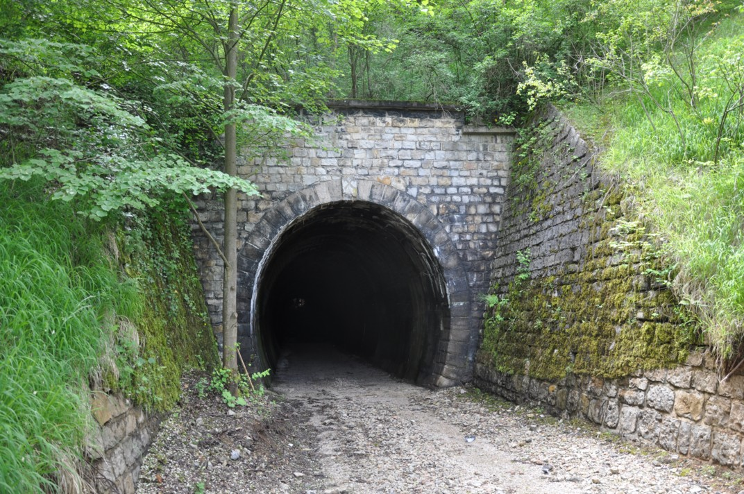 Tunnel Modrý lom, Tetín u Berouna, Kleinbahn Königshof–Beraun–Koněprus